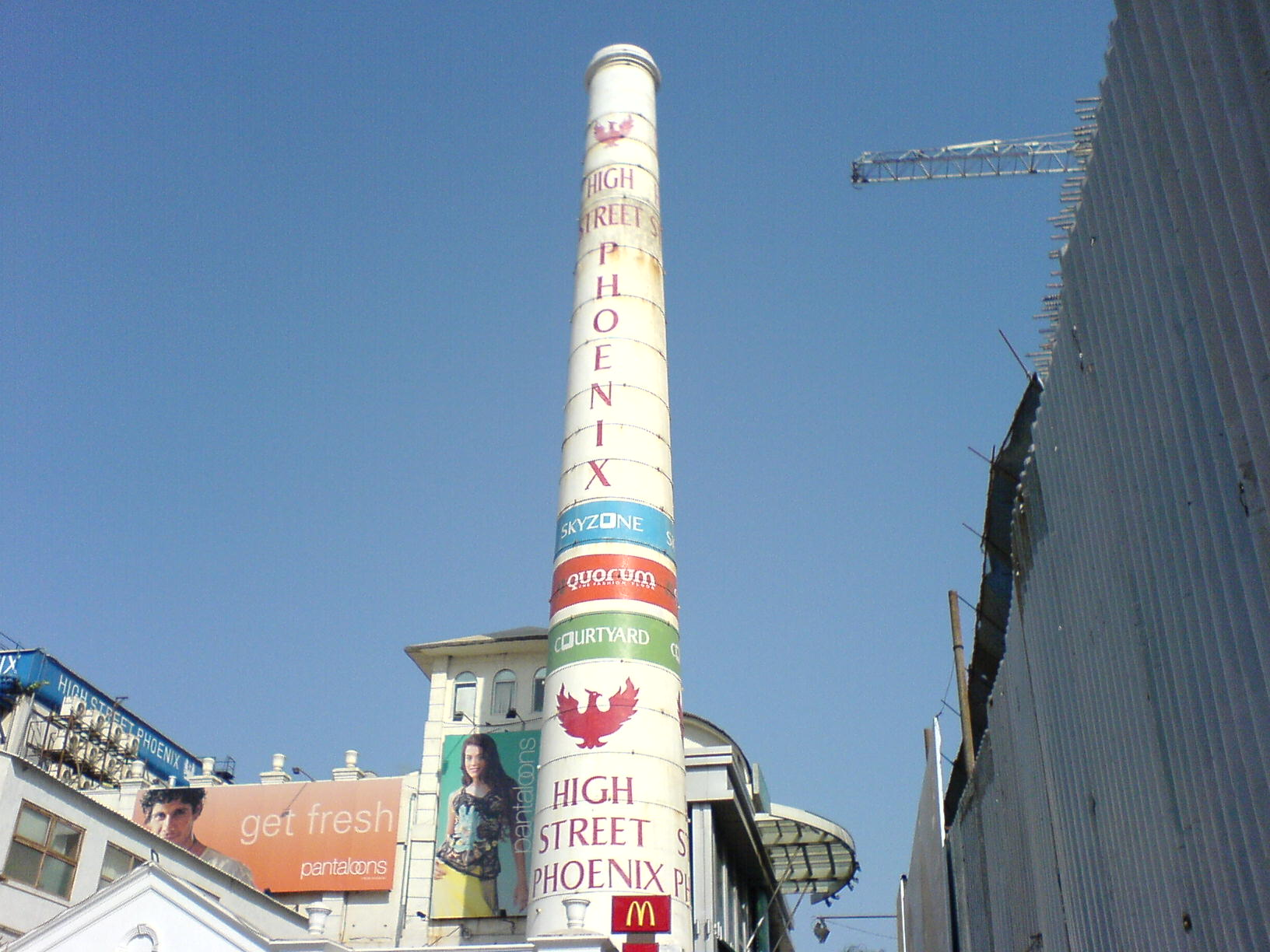 Phoenix mills, Mumbai